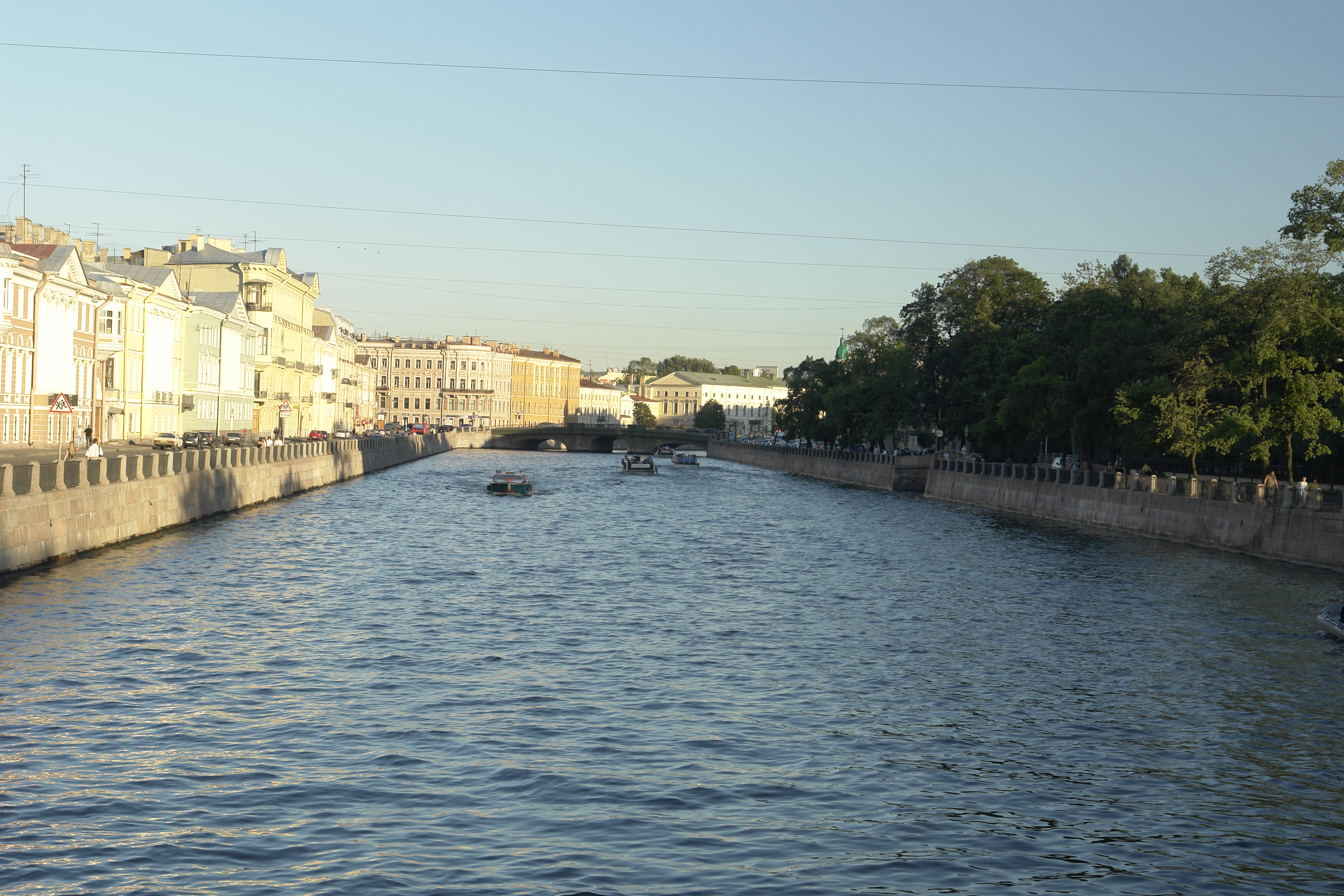 река Фонтанка, вид с Пантелеймоновского моста, справа Летний сад, слева набережная реки Фонтанки, виден мост Белинского.